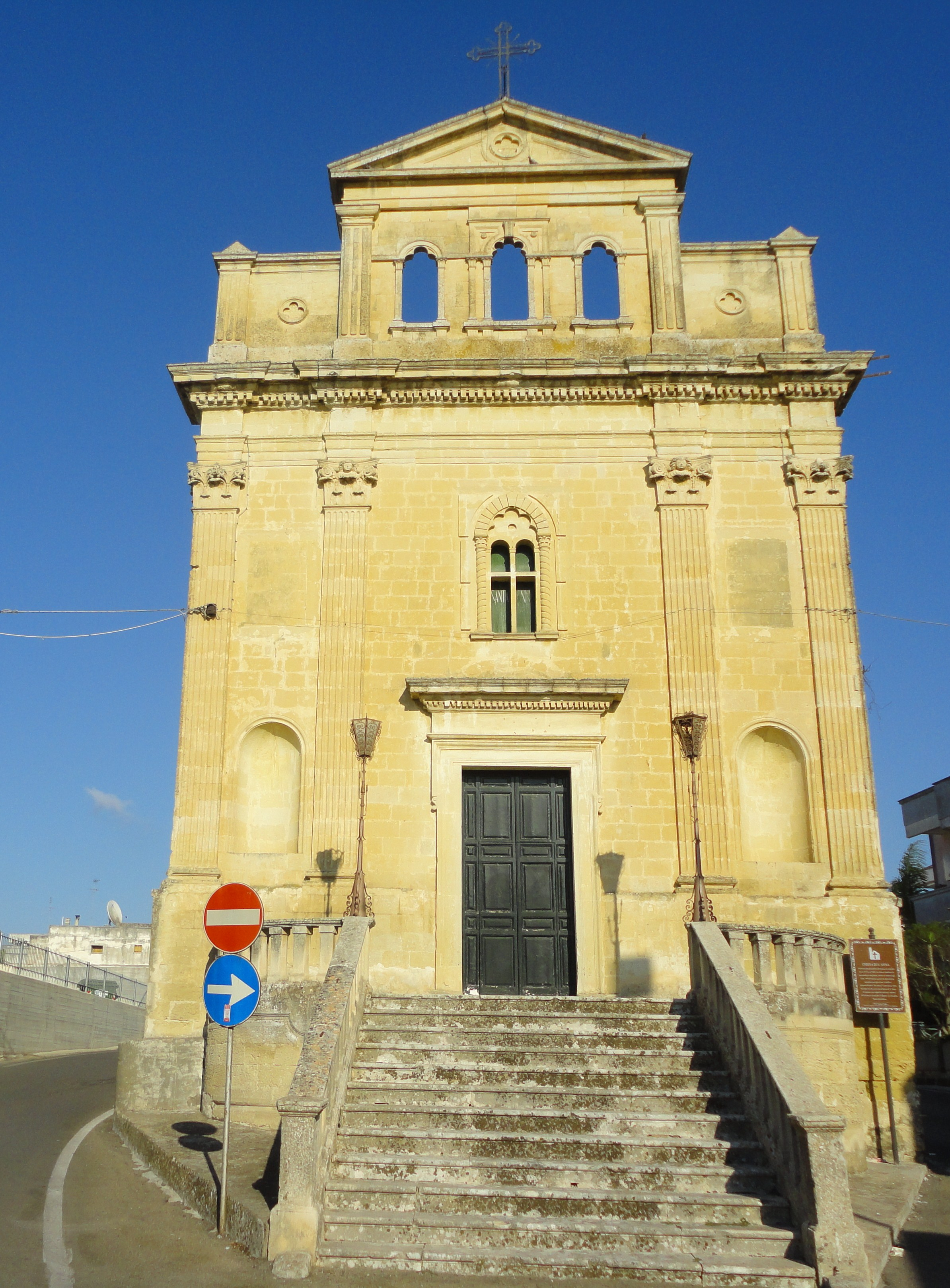 Chiesa di Sant'Anna Vernole, Lecce